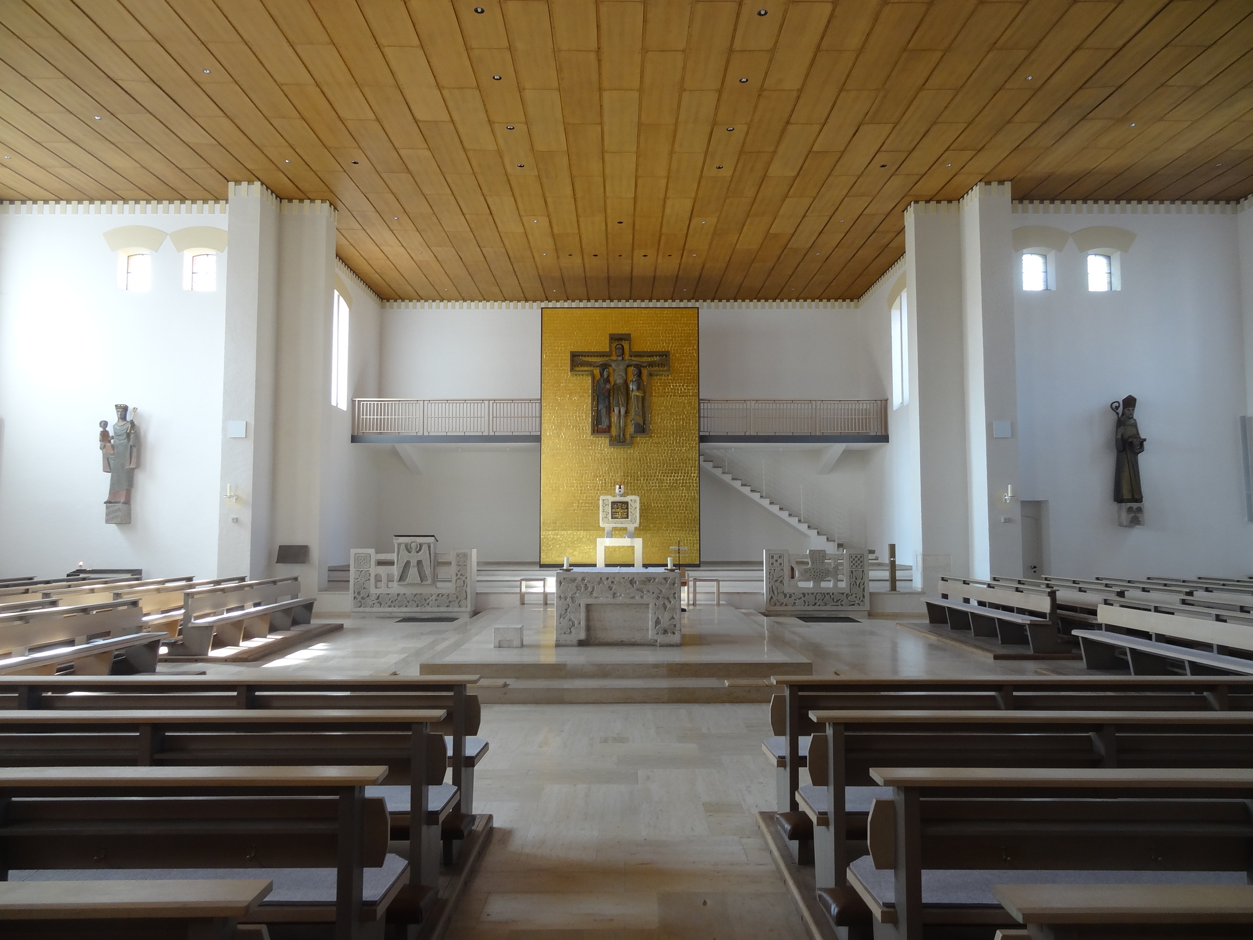 Innenraum der Pfarrkirche Neu-St. Nikola in Landshut